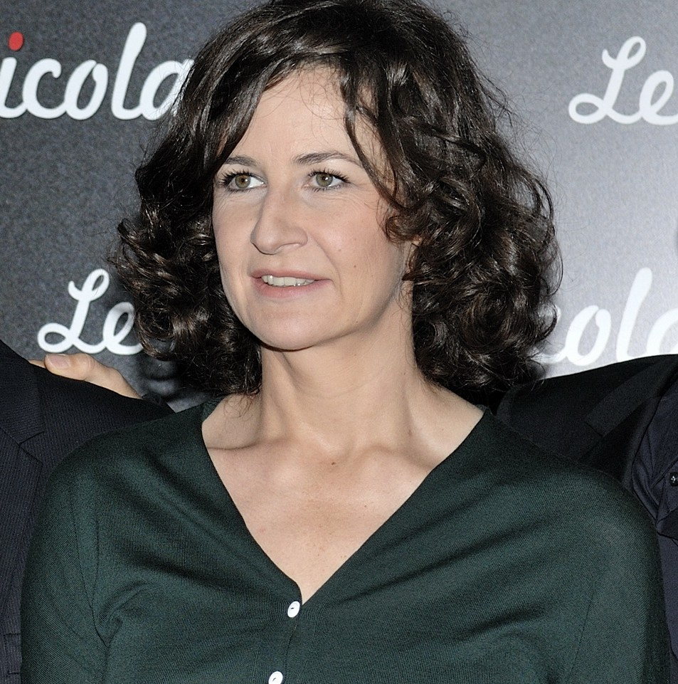 Avant-première du film Le Petit Nicolas au Grand Rex, à Paris, le 20 Septembre 2009, en présence de toute l'équipe de film. Ici, Valérie Lemercier.